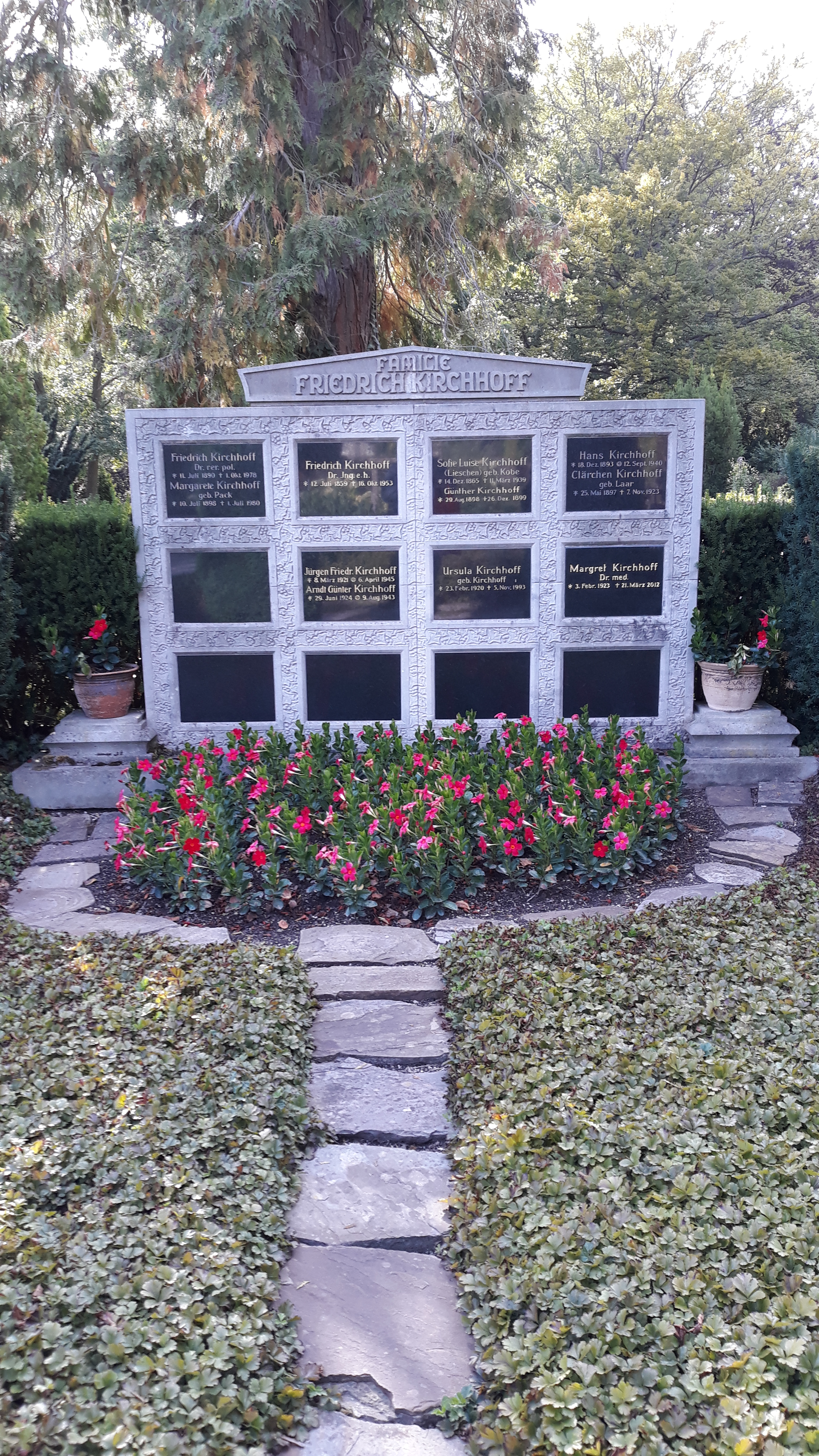 Das Familiengrab der deutschen Unternehmerfamilie Kirchhoff auf dem Hauptfriedhof Iserlohn.